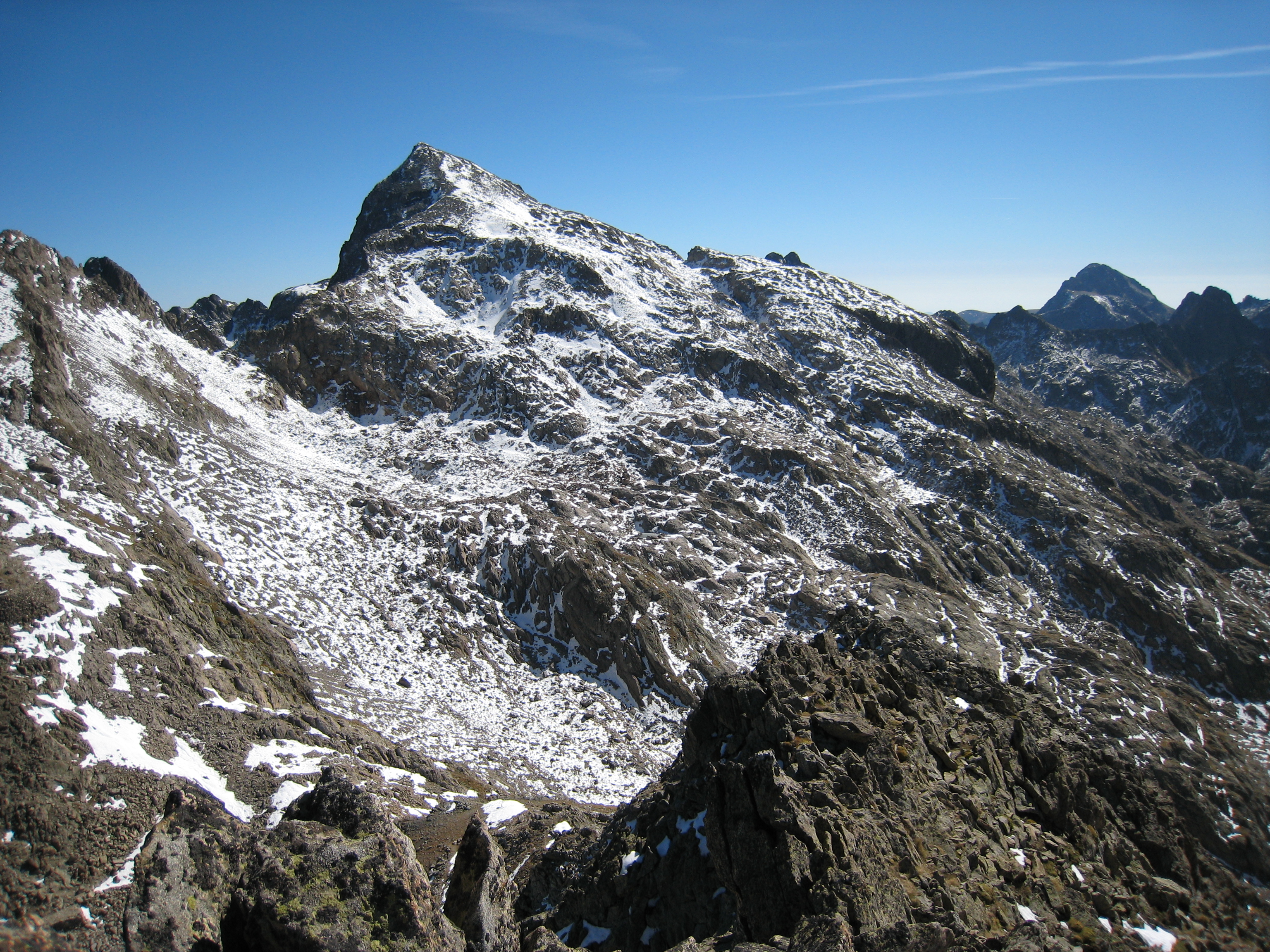 Photo personnelle